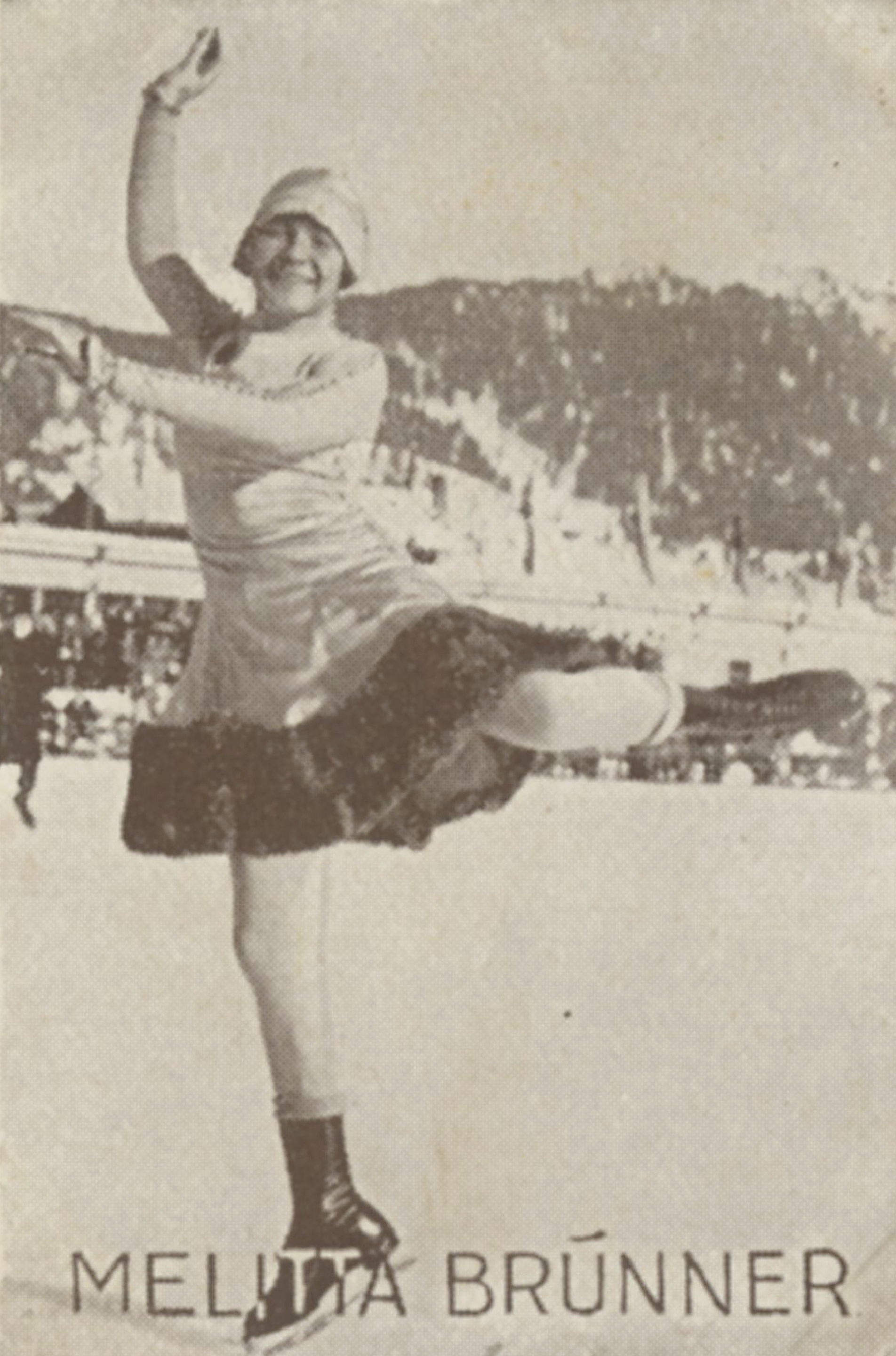 Format: Samlekort Dato / Date: ca. 1930 (dokumentet) Fotograf / Photographer: Ukjent Wikipedia: Melitta Brunner (1907 - 2003) Eier / Owner Institution: Trondheim byarkiv, The Municipal Archives of Trondheim Arkivreferanse / Archive reference: Sportsklubben Freidig: Sigarettfoto ca. 1930 (Løpenr. 75) F23955 Tekst på baksiden: Melitta Brunner, den populære kunstløperske fra Wien, som iår (1930) deltar i verdensmesterskapet i New York som Sonja Henies konkurrent i dameløpet og dertil (med Ludwig Wrede som makker) i parløpet. Merknad: Disse samlekortene med bilder av norske og internasjonale idretthelter fulgte med i sigarettpakker på 1920 og 30-tallet - derav tobakksreklamen på baksiden. Samlekortene kommer fra Sportsklubben Freidigs arkiv, og inneholder nærmere 90 unike kort pent plassert i et samlealbum. Samleren var den senere skipsmegler Finn Følling (1914 – 1985).